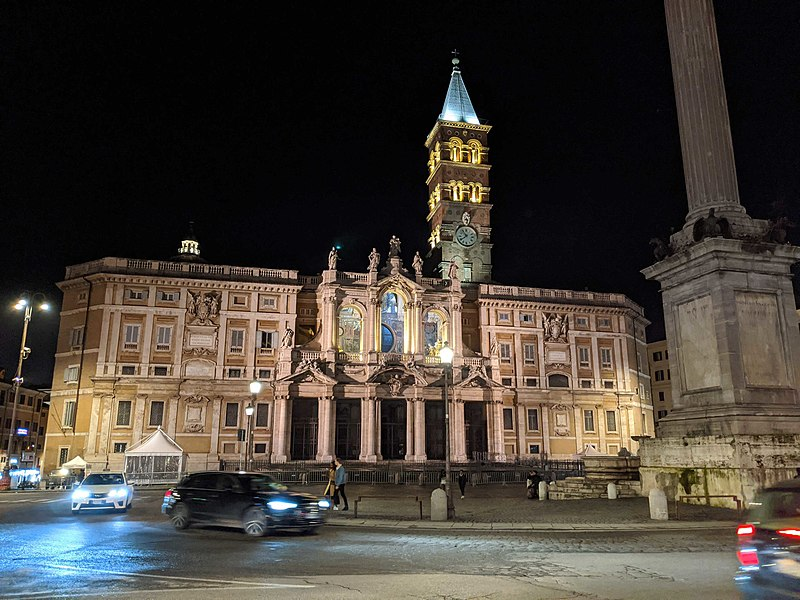 Maria maggiore